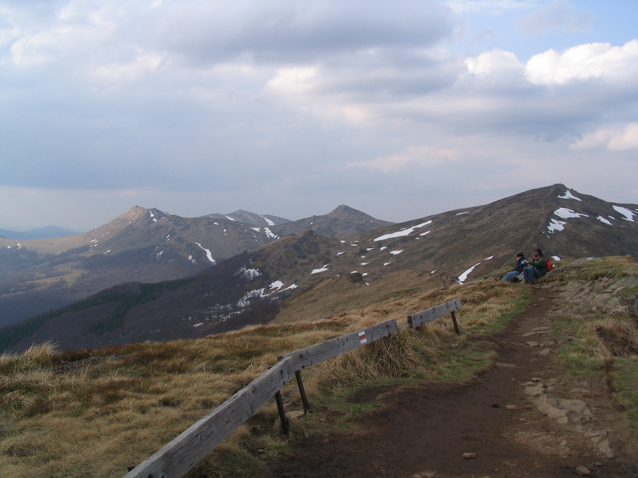 Halicz (1333 m. n.p.m.) (po prawej), po lewej Krzemień. Author: Piotr Tysarczyk